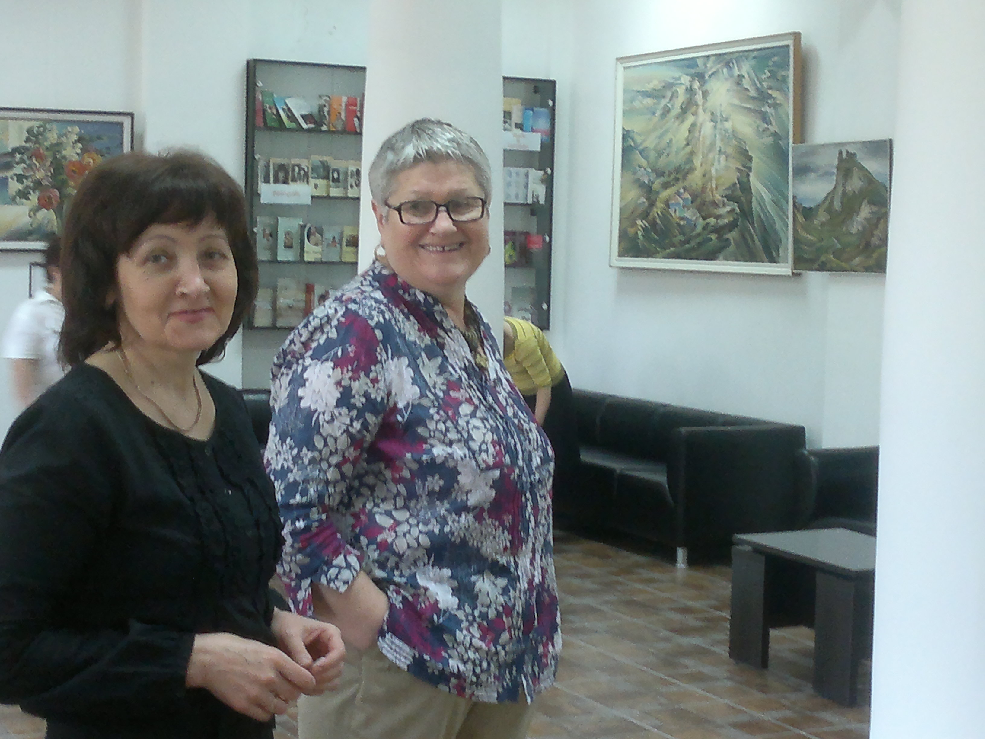 Sediul Central al BM "B.P. Hasdeu" renovat 23.04.2013